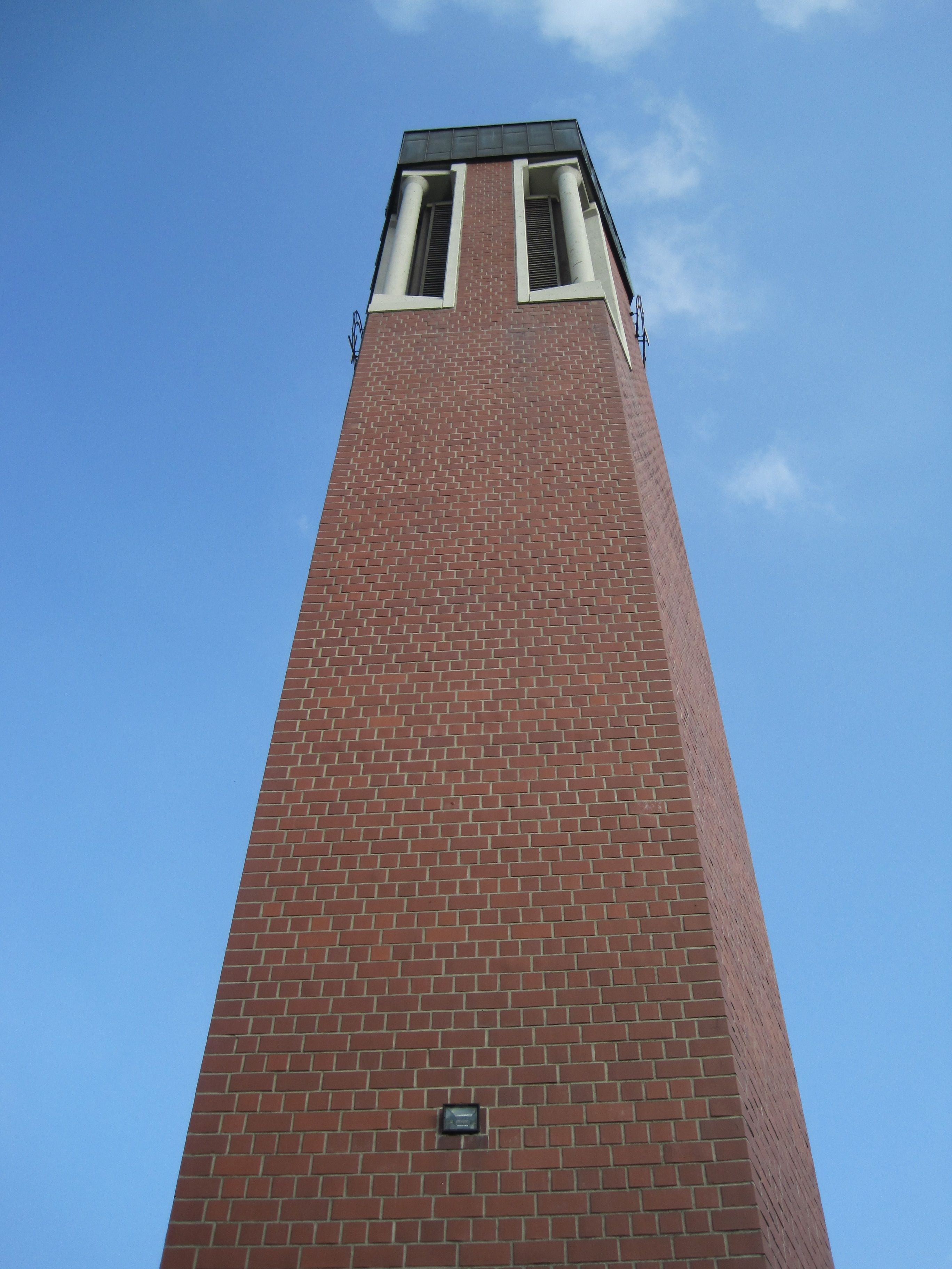 Das Foto zeigt die Christuskirche in Hamm-Bockum-Hövel.